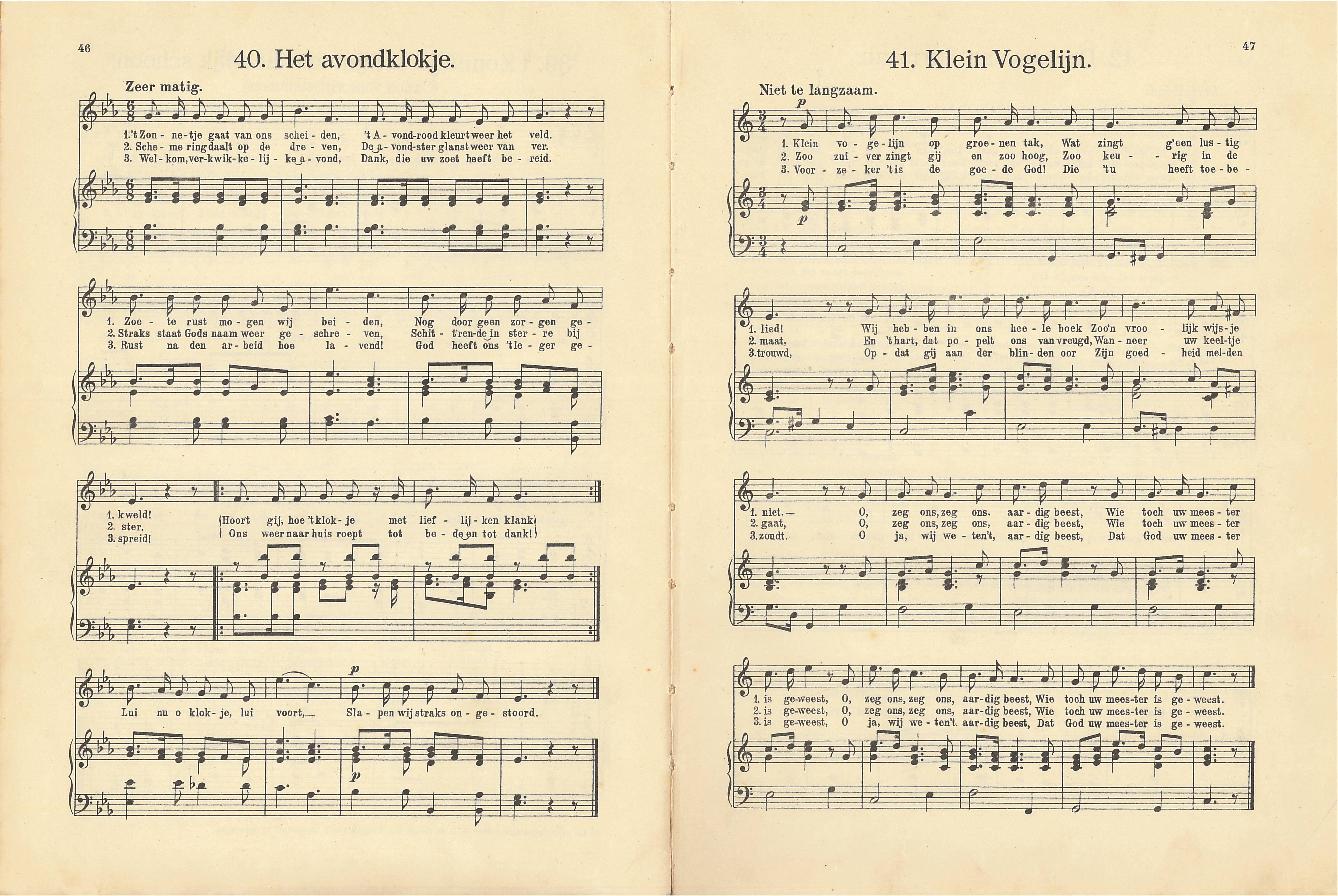 Kun je nog zingen, zing dan mee. Muziek en teksten origineel gepubliceerd voor 1900.